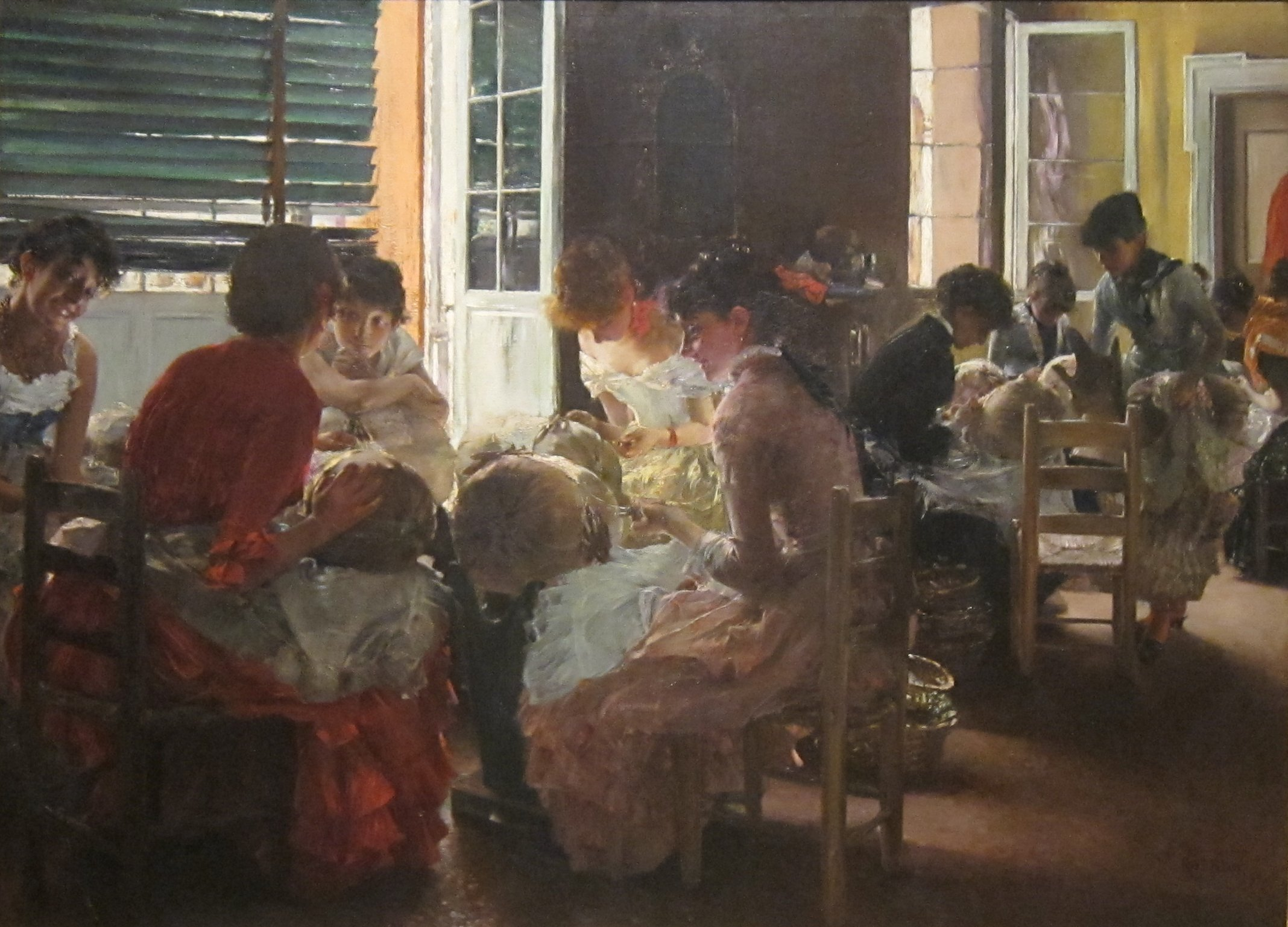 Venetian Lacemakers